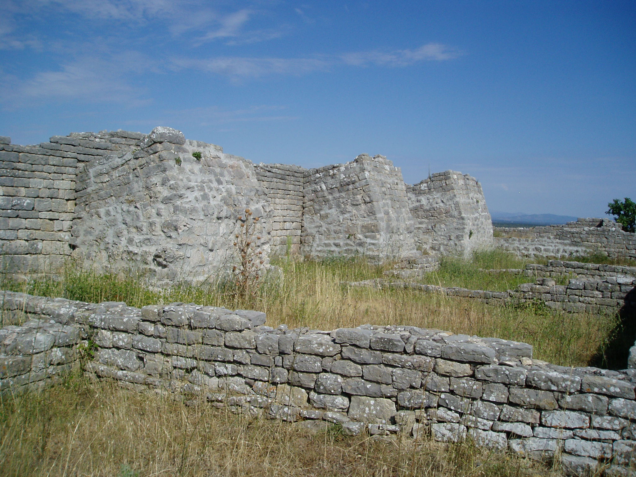 Arheološka zona Bribirska glavica